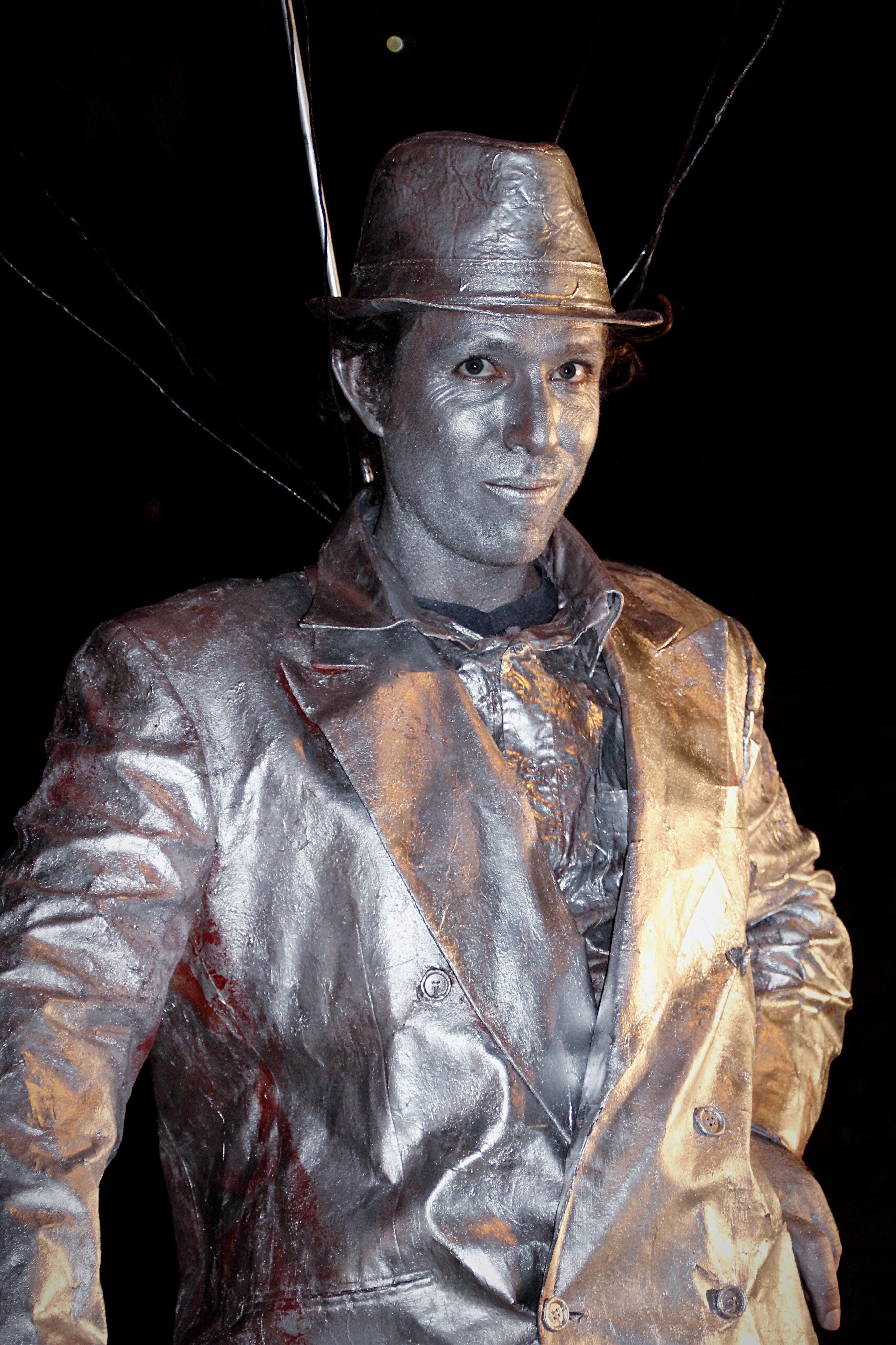 מופע של איש צבוע בכסף מפסטיבל 2016